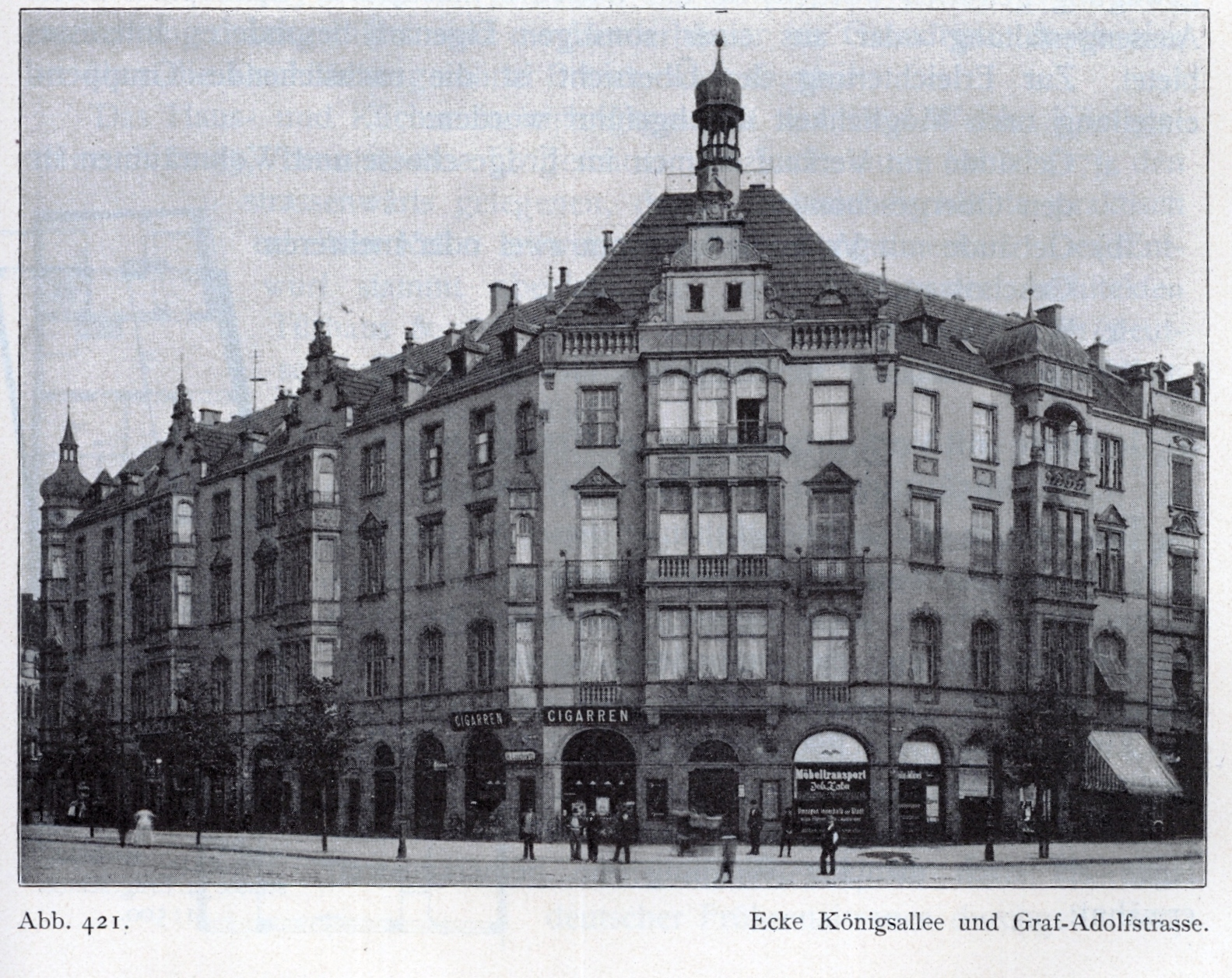 Essmannschen Geschäfshäuser Blockrandbebauung an der Graf-Adolf-Straße von Ecke Königsallee (hier im Bild Einsicht in die Kleine Königsallee) bis Hüttenstraße in Düsseldorf, von 1894 bis 1895, Architekten Kayser & von Großheim und Wöhler